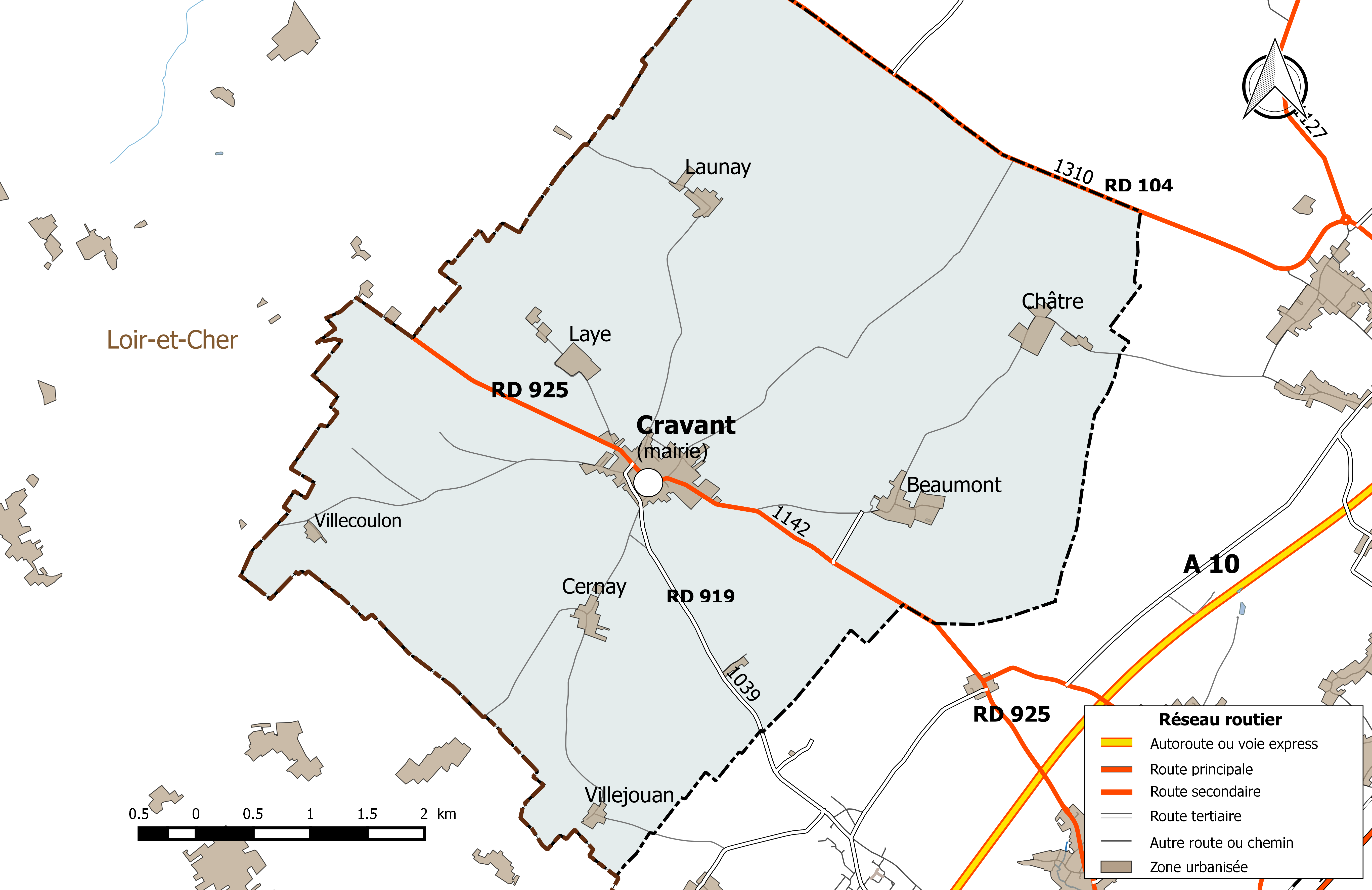 Carte du réseau routier de la commune de Cravant (Loiret).